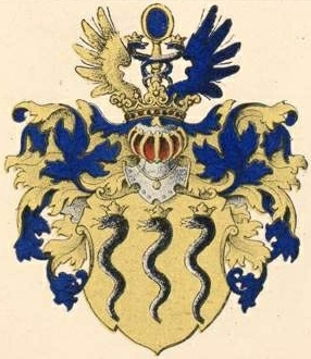 Rehbinderi suguvõsa aadlivapp